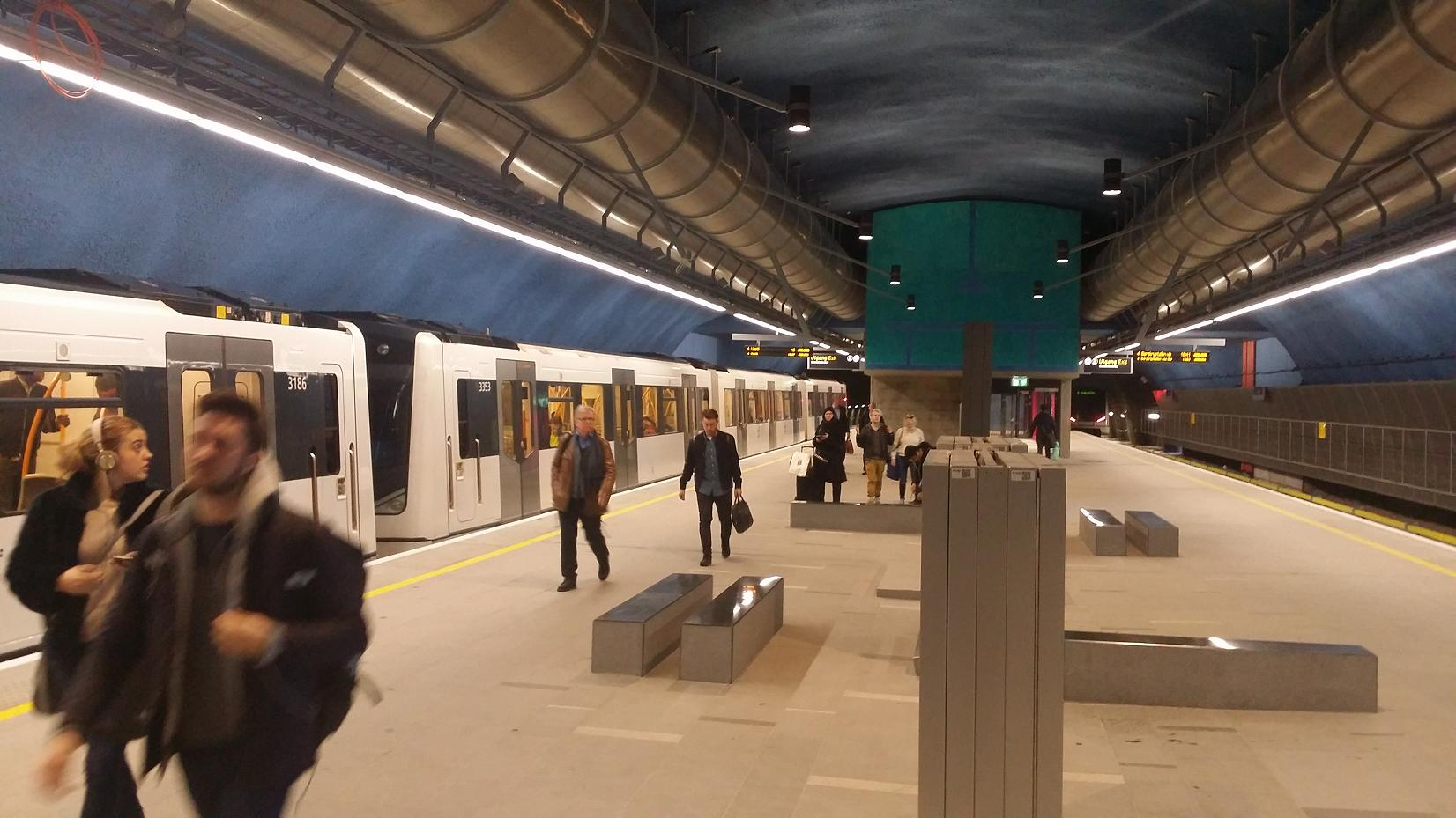 Løren T-banestasjon.